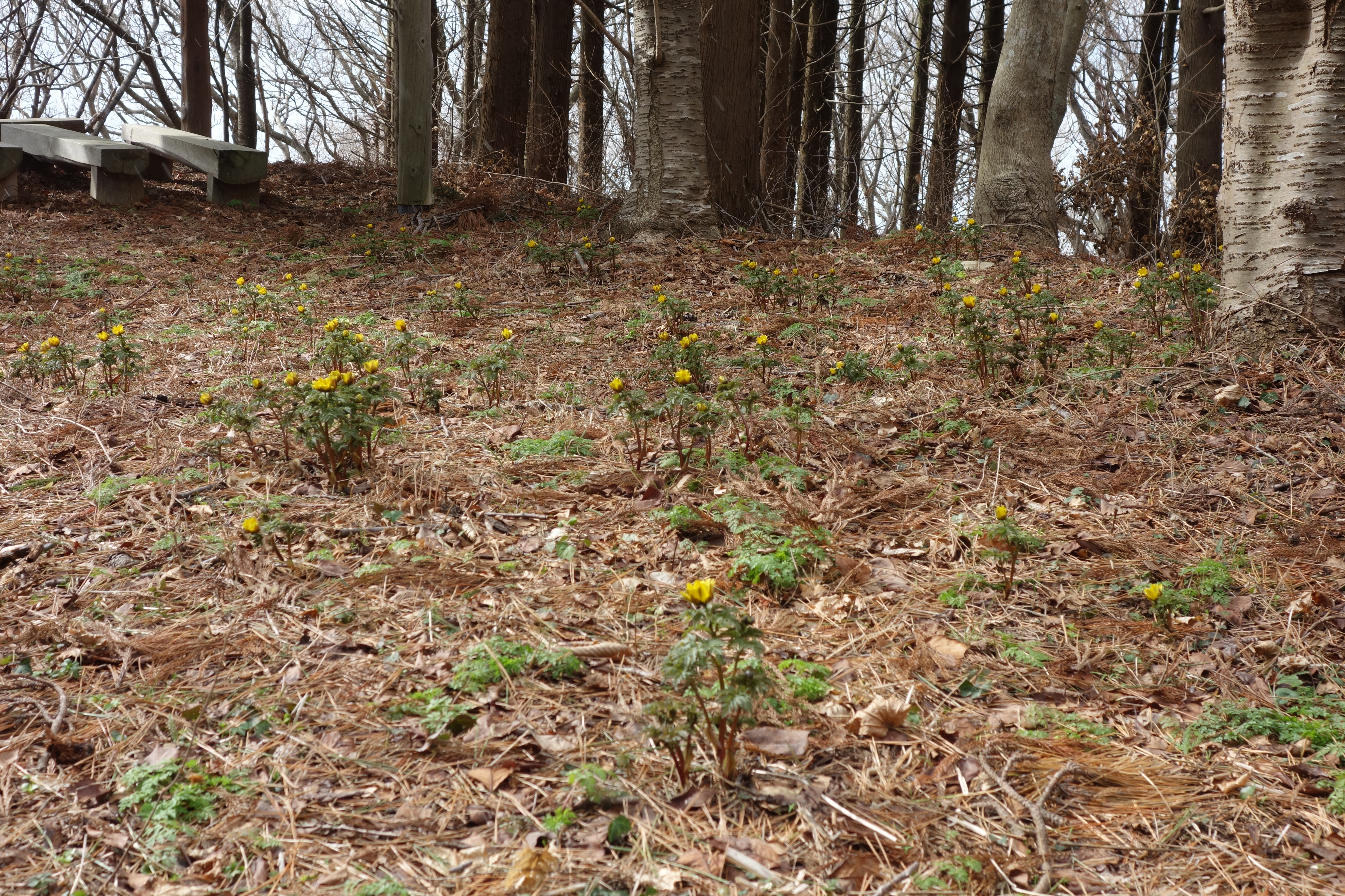 青森県深浦町の大間越関所跡にある福寿草公園の福寿草